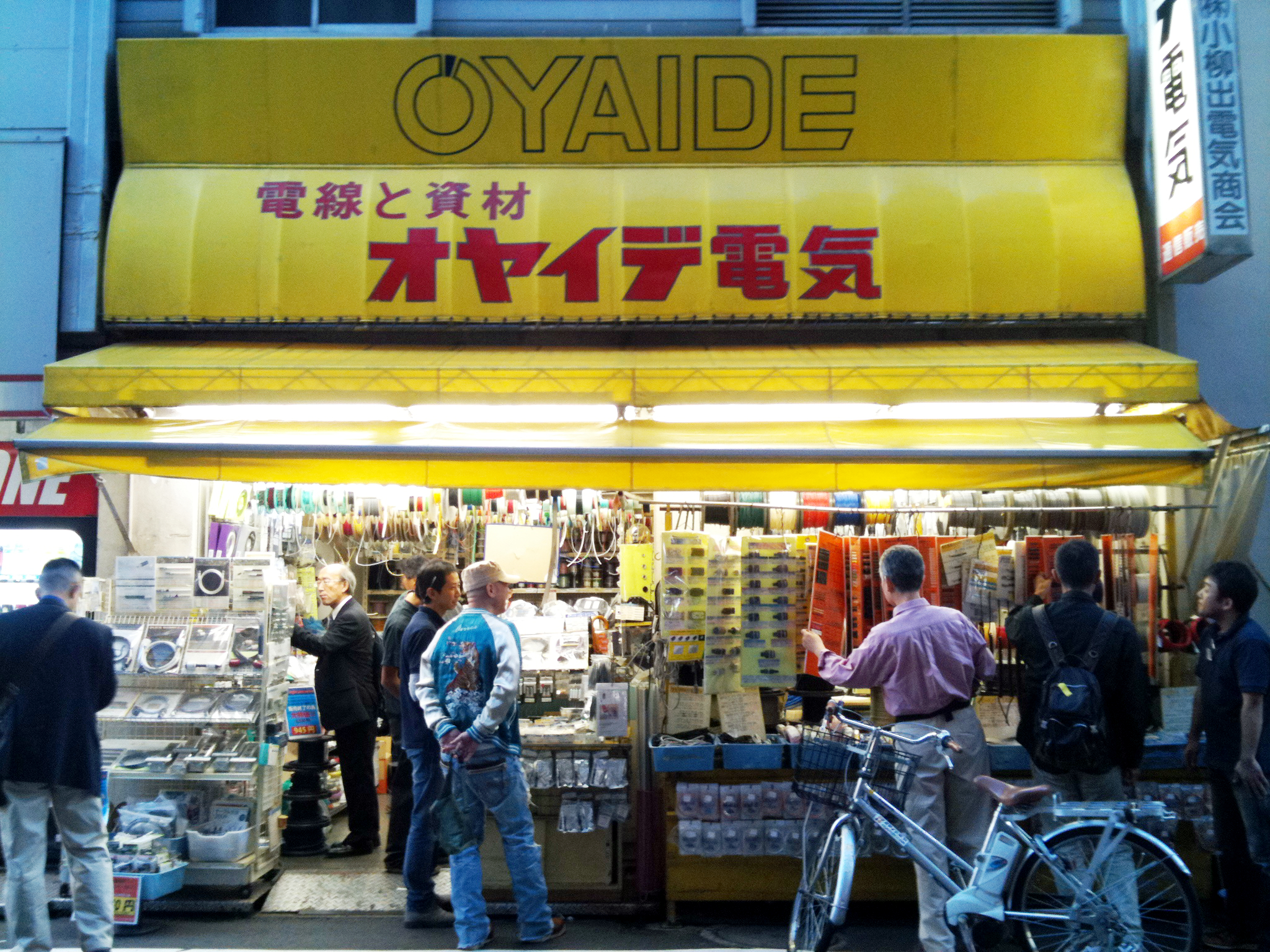 Oyaide Denki (Cable Shop), 2010-09-25